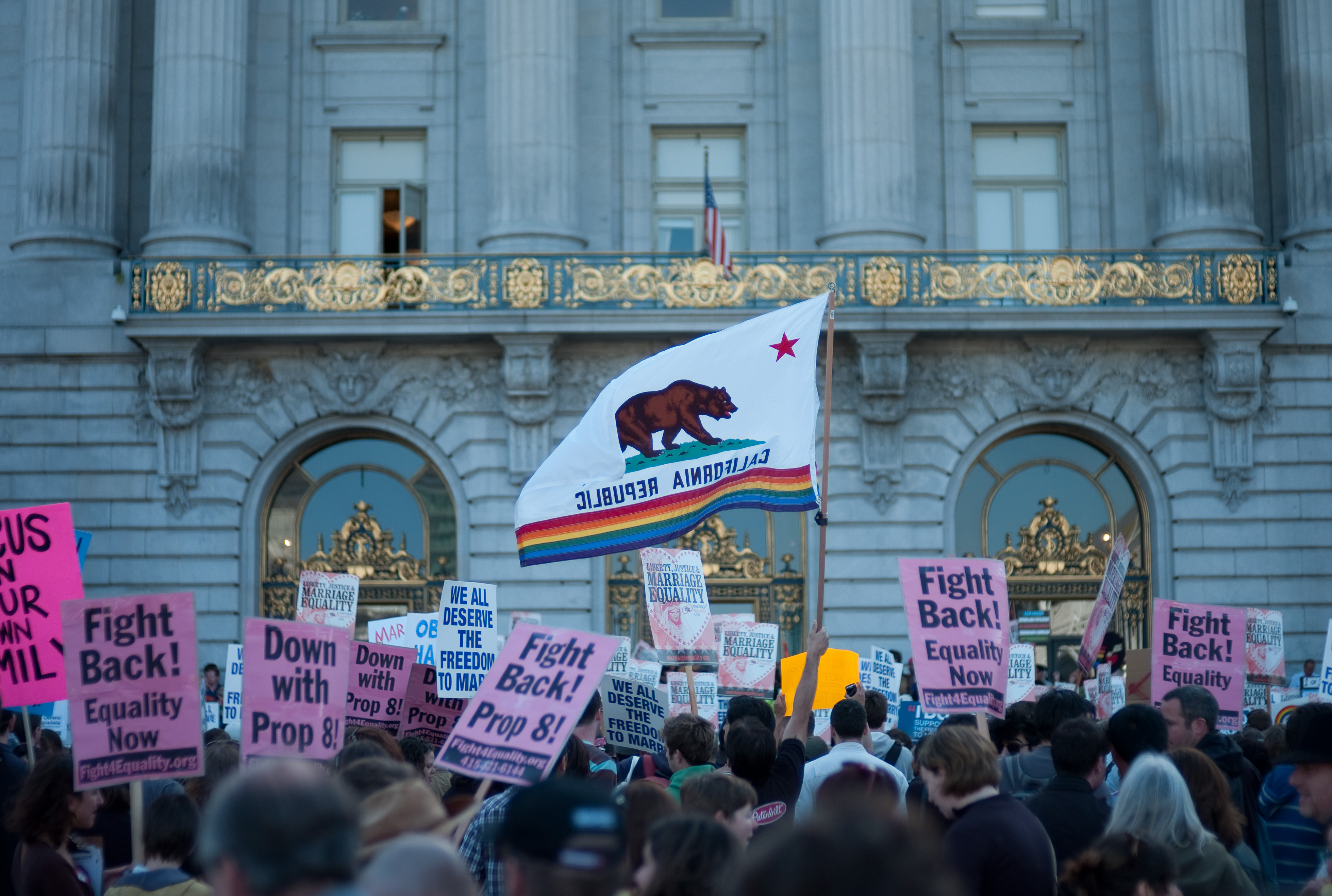 Manifestazione per il rigetto della referendum California Proposition 8.